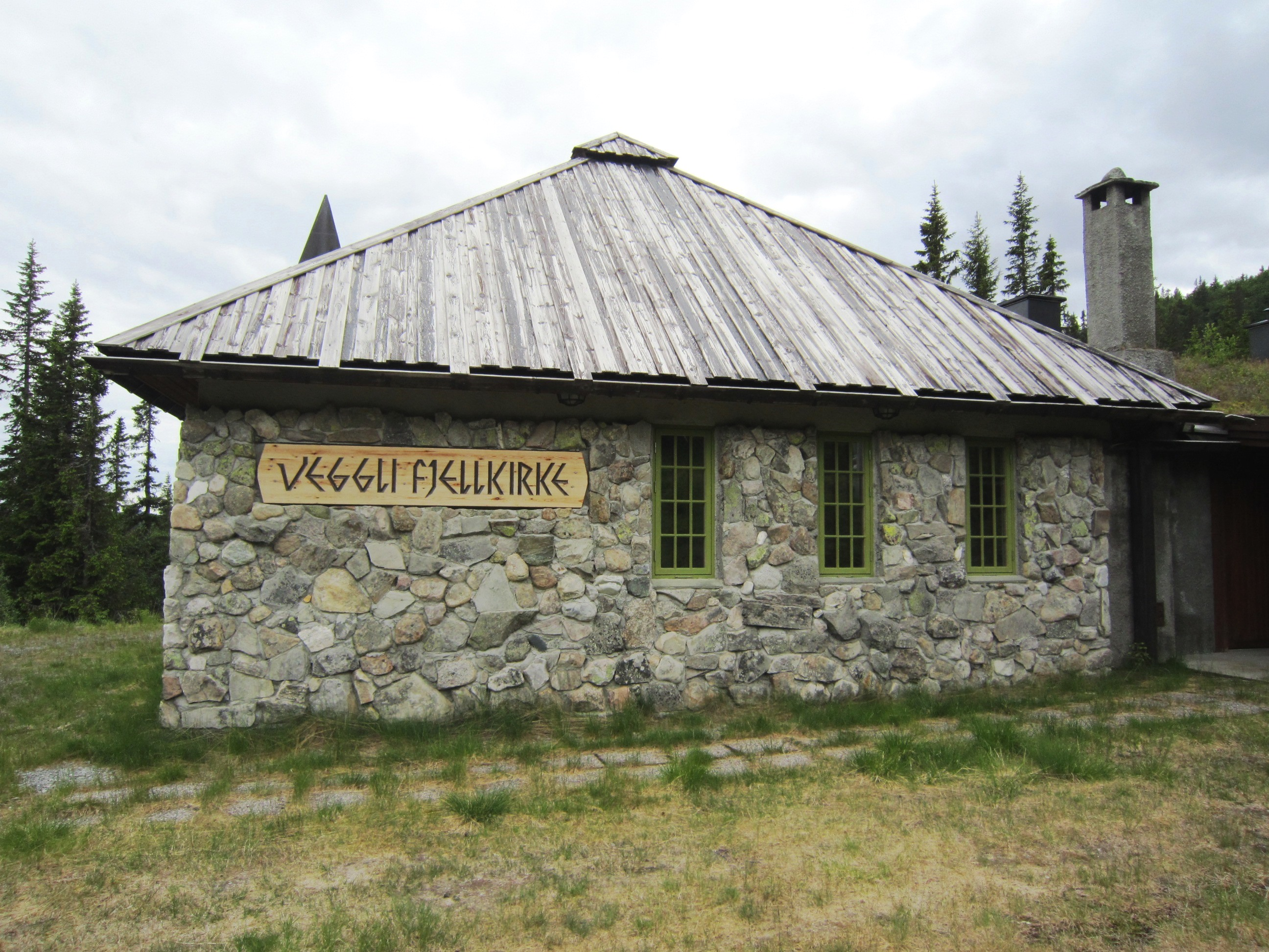 Veggli fjellkirke